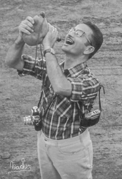 Projecte de col·laboració de l'Arxiu Ismael Latorre Mendoza amb Amical Wikimedia i Wikimedia Commons. Projecte: recuperació de l'obra fotogràfica d'En Vicente Nácher Vendrell, les fotografies familiars i el seu Arxiu. Treball conjunt de l'Arxiu Fotogràfic Familiar Nácher (Algemesí) i de l'Arxiu Ismael Latorre Mendoza (Alginet). Tractament digital: Vicenç Salvador Torres Guerola. Fotografia familiar de Vicente Nácher Vendrell, feta a la plaça de bous d'Algemesí, a l'any 1973. Drets de publicació: Concessió de drets de publicació a Wikimedia Commons dels fills i hereus legals de l'Arxiu Fotogràfic Familiar Nácher, Vicente Ramon Nácher Sánchez i María Nieves Nácher Sánchez, amb una llicència Creative Commons-BY-SA 3.0, a Vicenç Salvador Torres Guerola i a l'Arxiu Ismael Latorre Mendoza. Data de les autoritzacions: 25-09-2018, en Cullera i Carcaixent. Dades del fotògraf Vicente Nácher Vendrell: Naixement: 3 de febrer de 1924, a Algemesí. Defunció: 16 de Maig de 1985, a València. Dècades importants dedicades a la fotografia: dels 50 als 80 (fins a la seua mort).